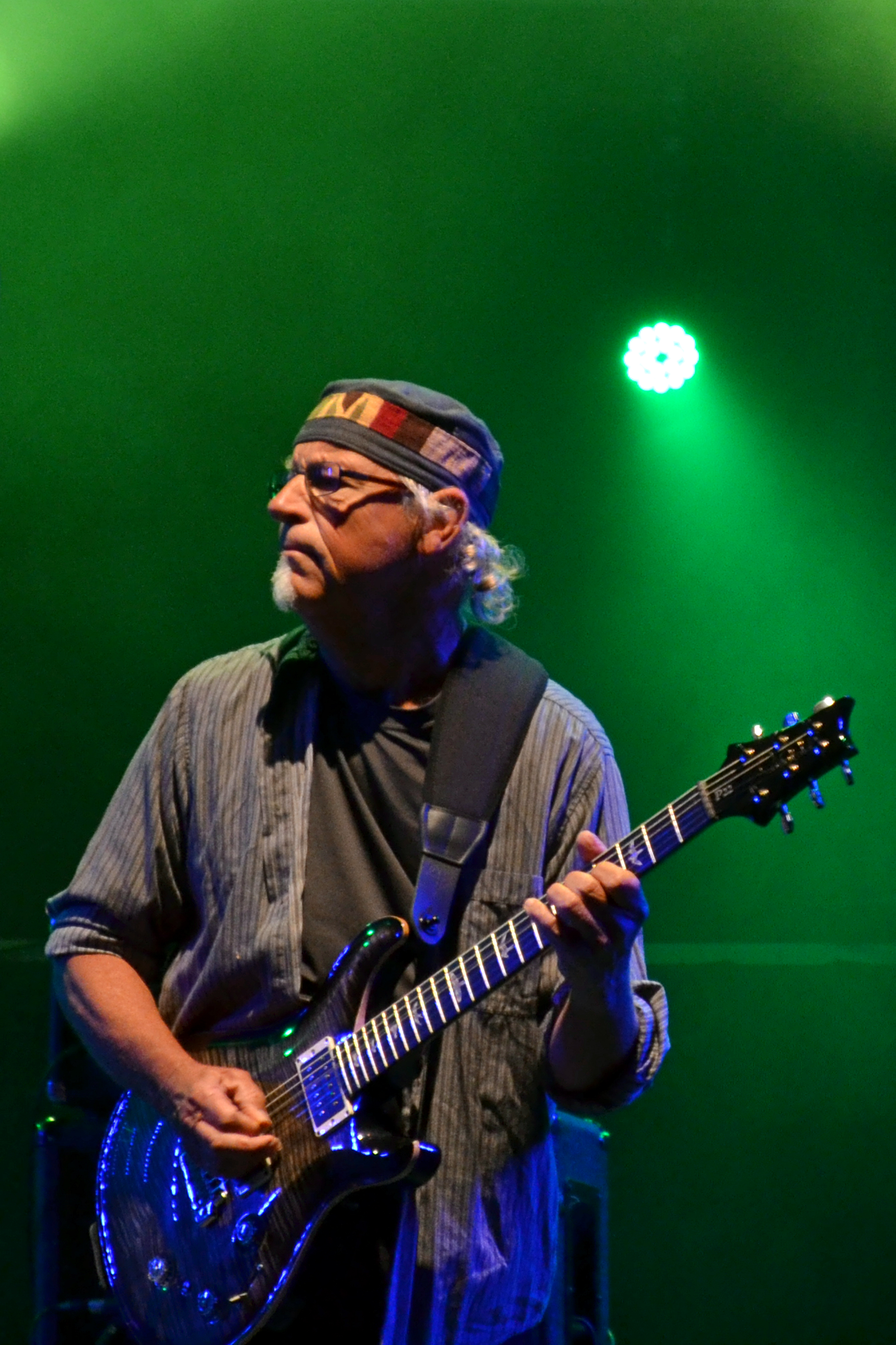 Martin Barre en guest pour le concert de Pat O'May au festival de la Saint-Loup à Guingamp le 12 août 2013.